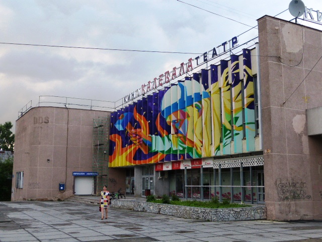 Кинотеатр "Калевала" в Петрозаводске на пр.Первомайском (открыт в 1978 году, архитектор Тамара Ковалевская)